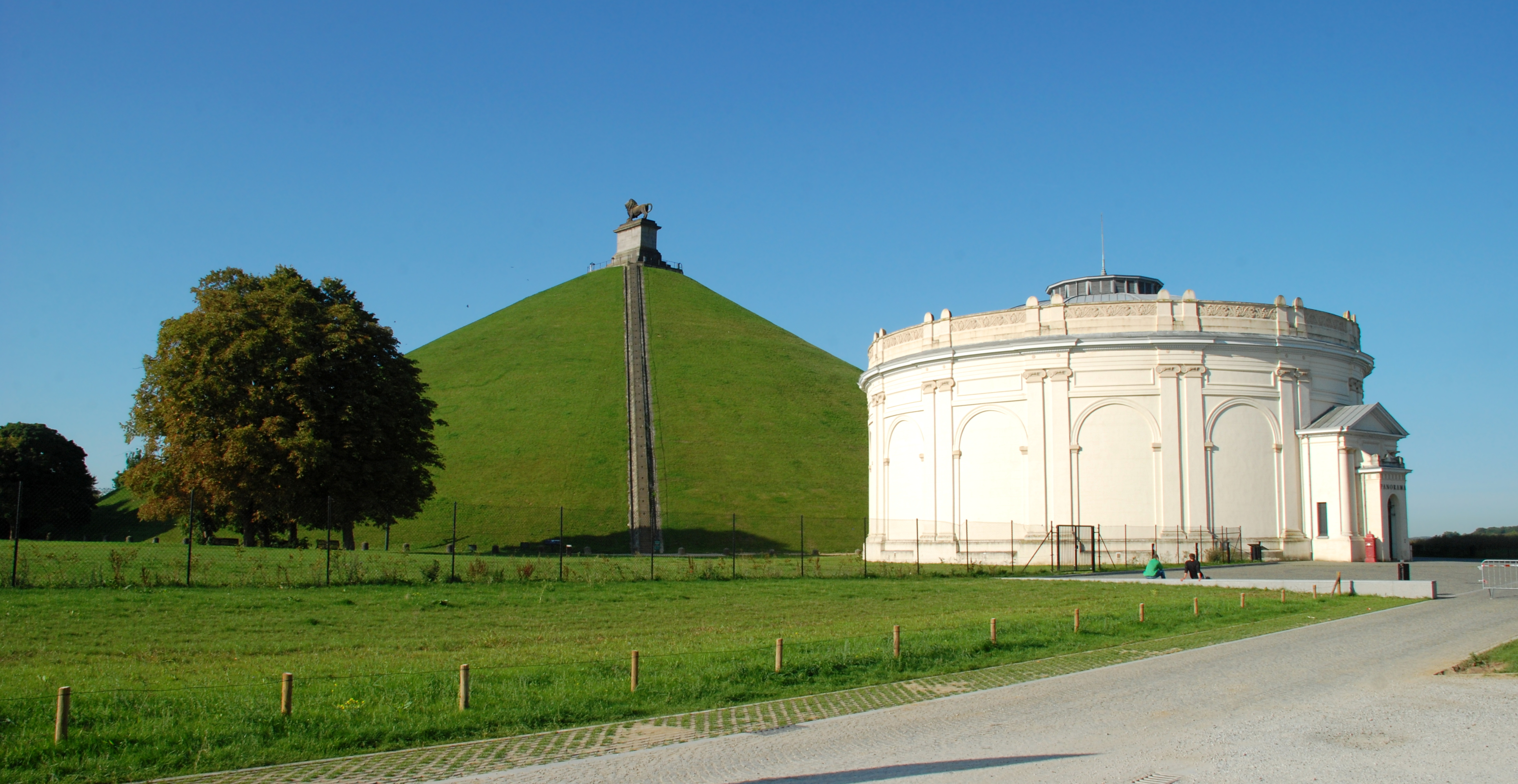 Belgique - Brabant wallon - Braine-l'Alleud - Panorama de la bataille de Waterloo (style néo-classique)